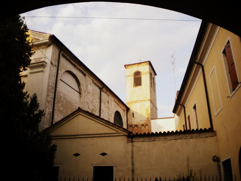 Chiesa di Santa Caterina a Padova esterno e campanile